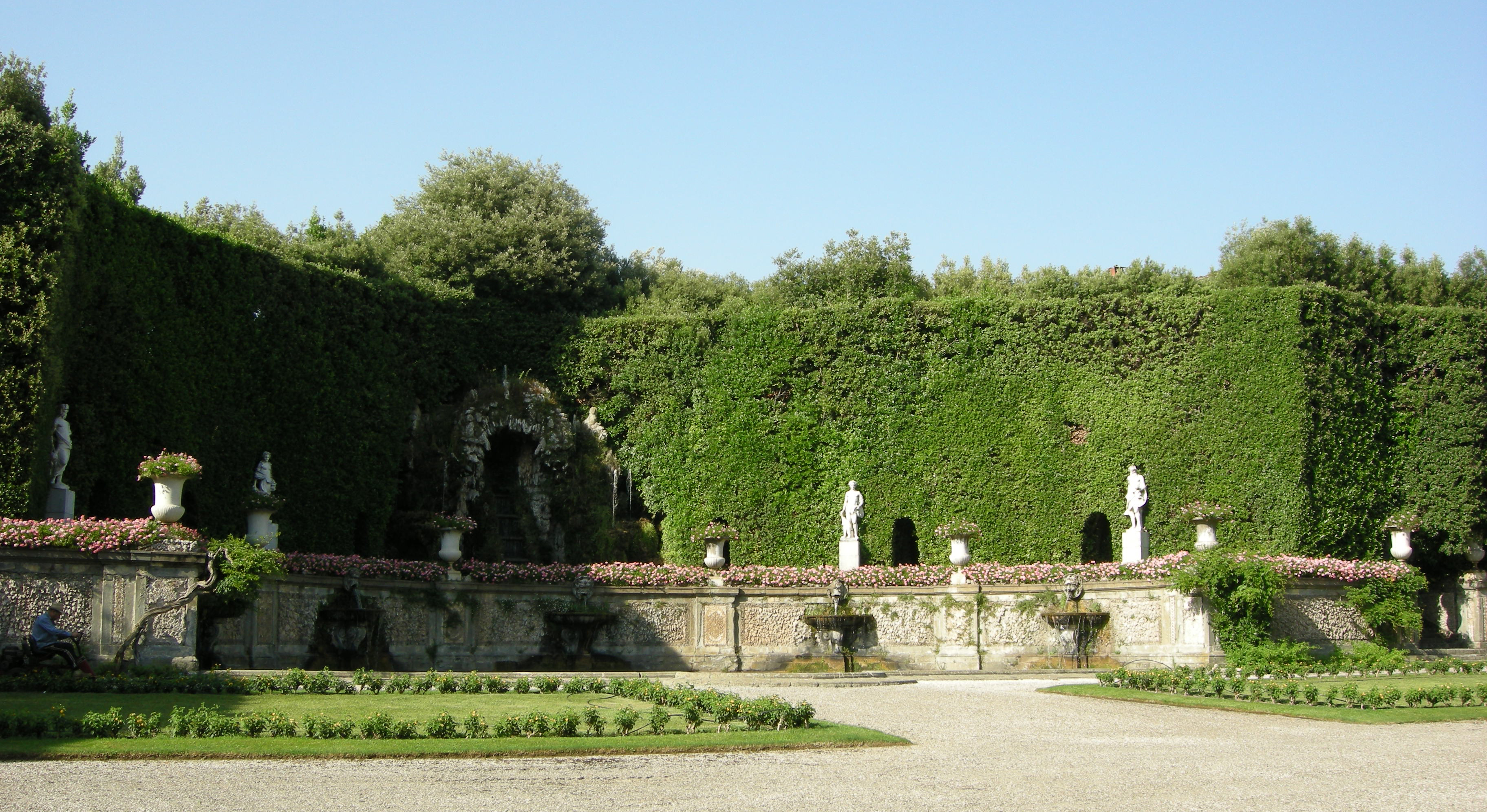 Villa reale di marlia, teatro d'acqua